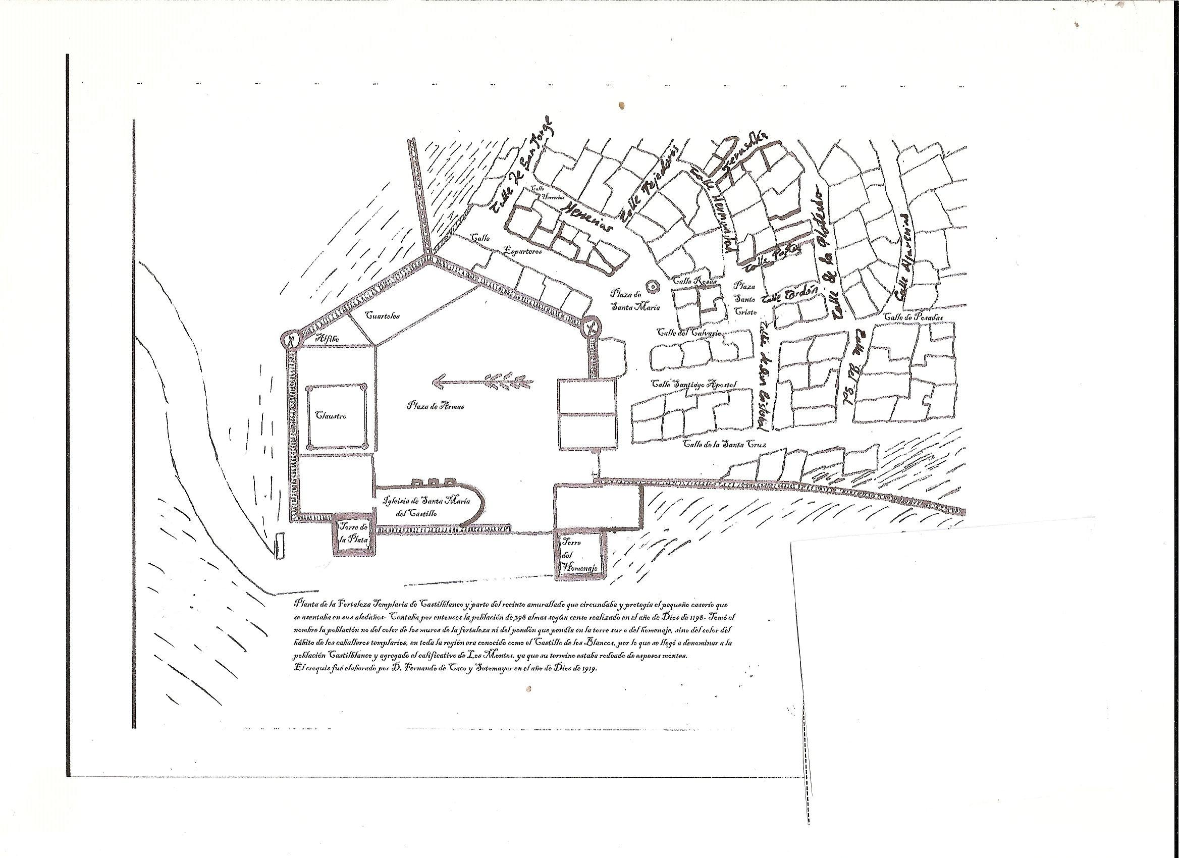 Planta de la fortaleza templaria de Castilblanco y parte del recinto amurallado en el siglo XII